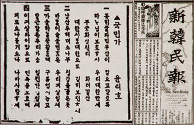 신한민보 1910년 09월 21일자에 올려진 윤치호작 국민가